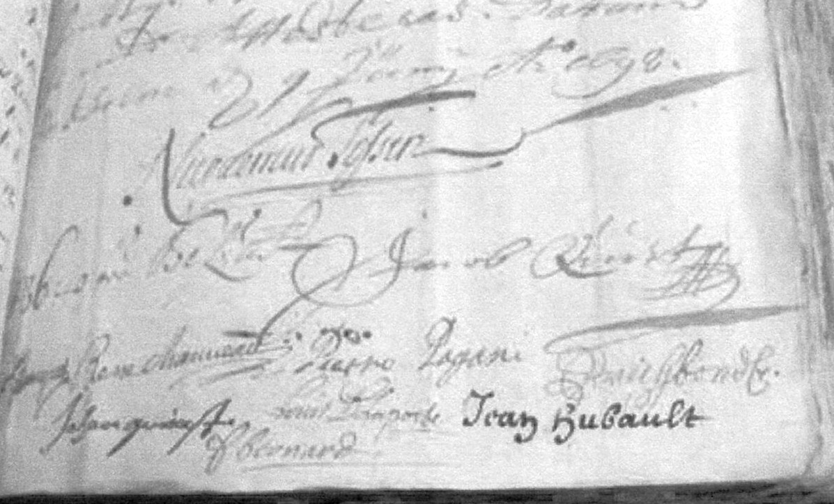 Kvittenser på utbetald lön i samband med bygget för Stockholms slott, omkring 1700, bland namnteckningar märkst "Nicodemus Tessin"